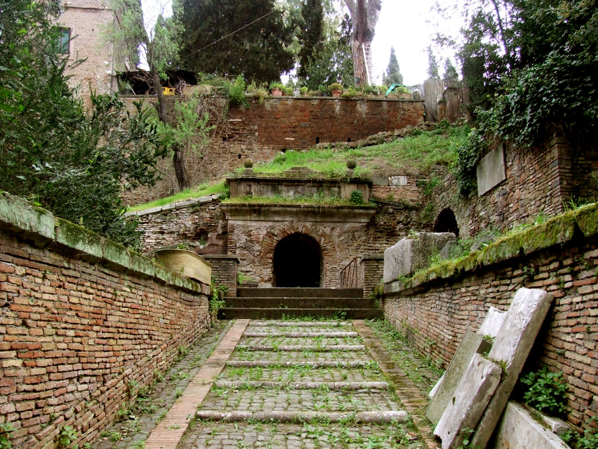 Sepolcro degli Scipioni, Roma, entrata